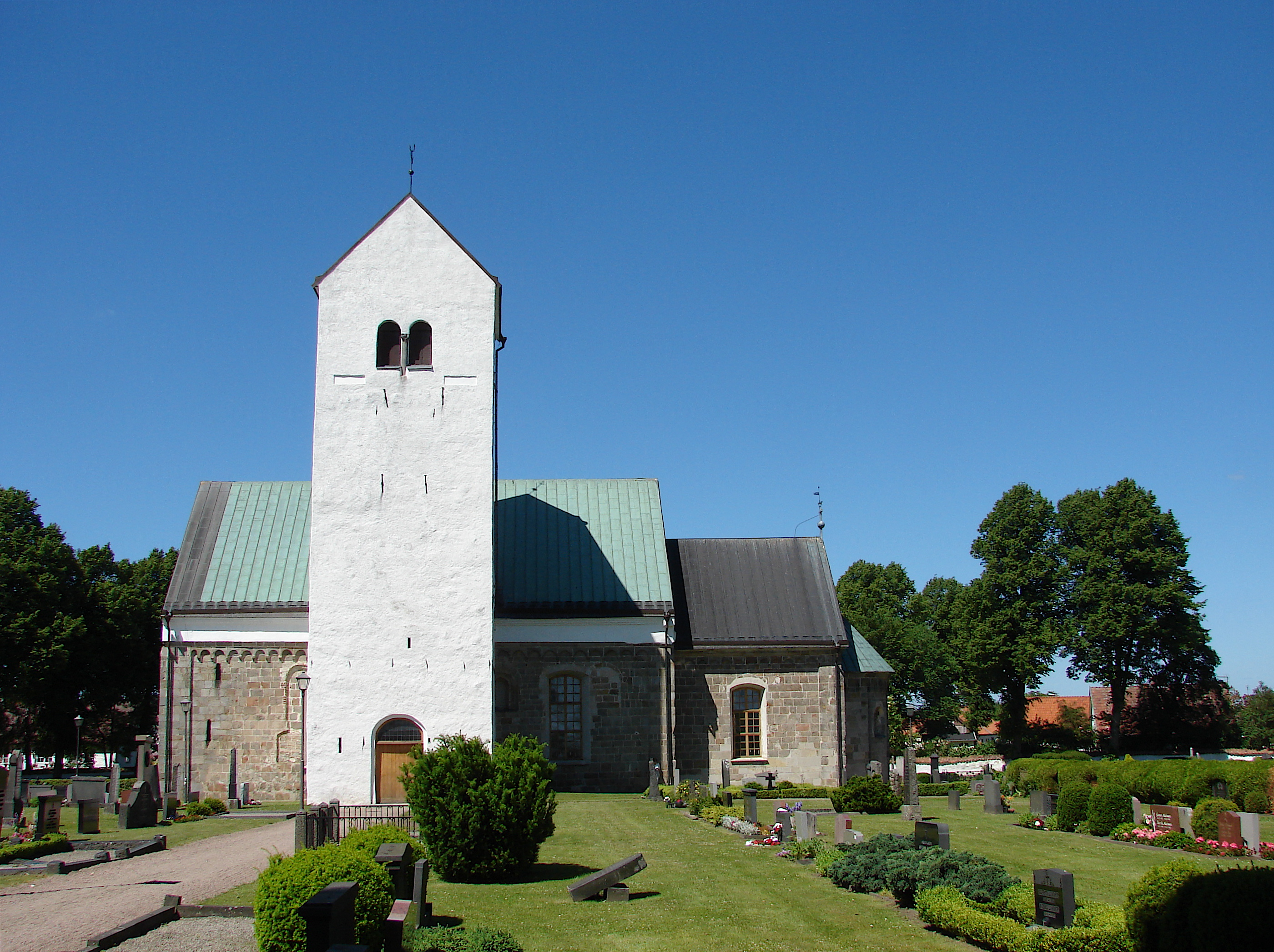 Vä, Væ, Whæ kirke, Sankta Maria kirke